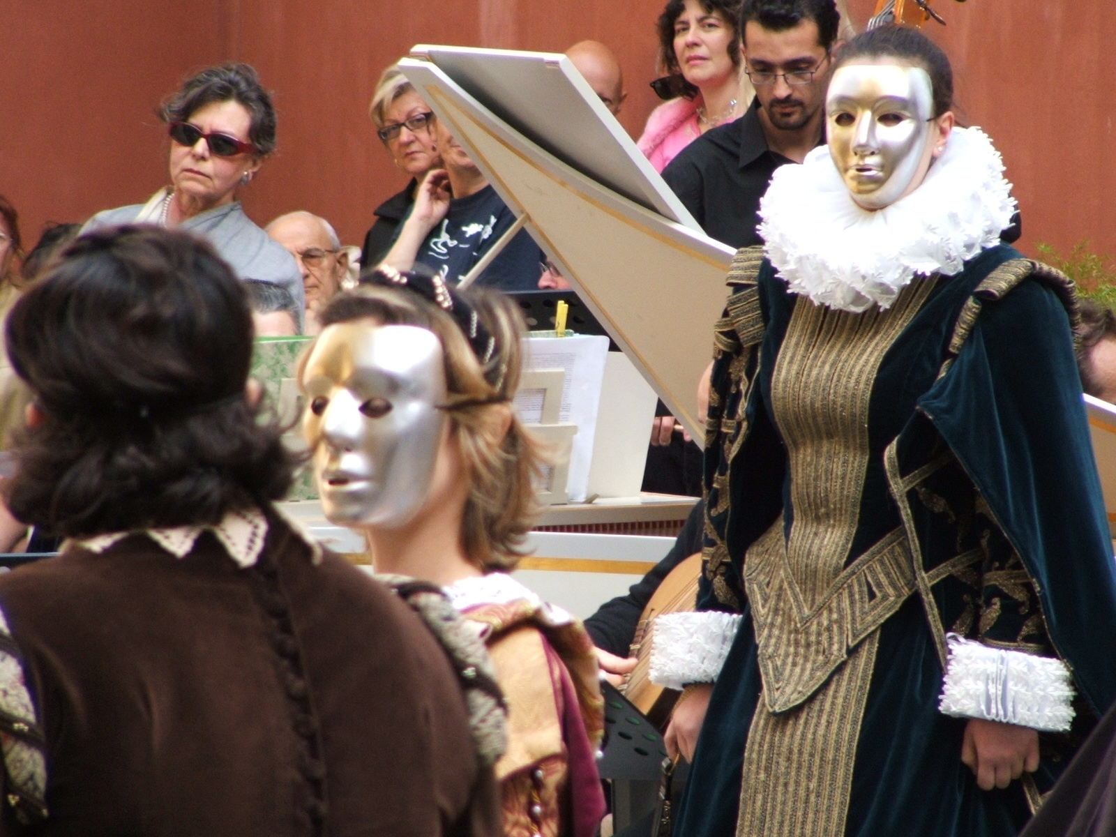 Genova, Palazzo Rosso - Rappresentazione de "Il ballo delle ingrate" - Madrigale in genere rappresentativo di Claudio Monteverde, testo di Ottavio Rinuccini.